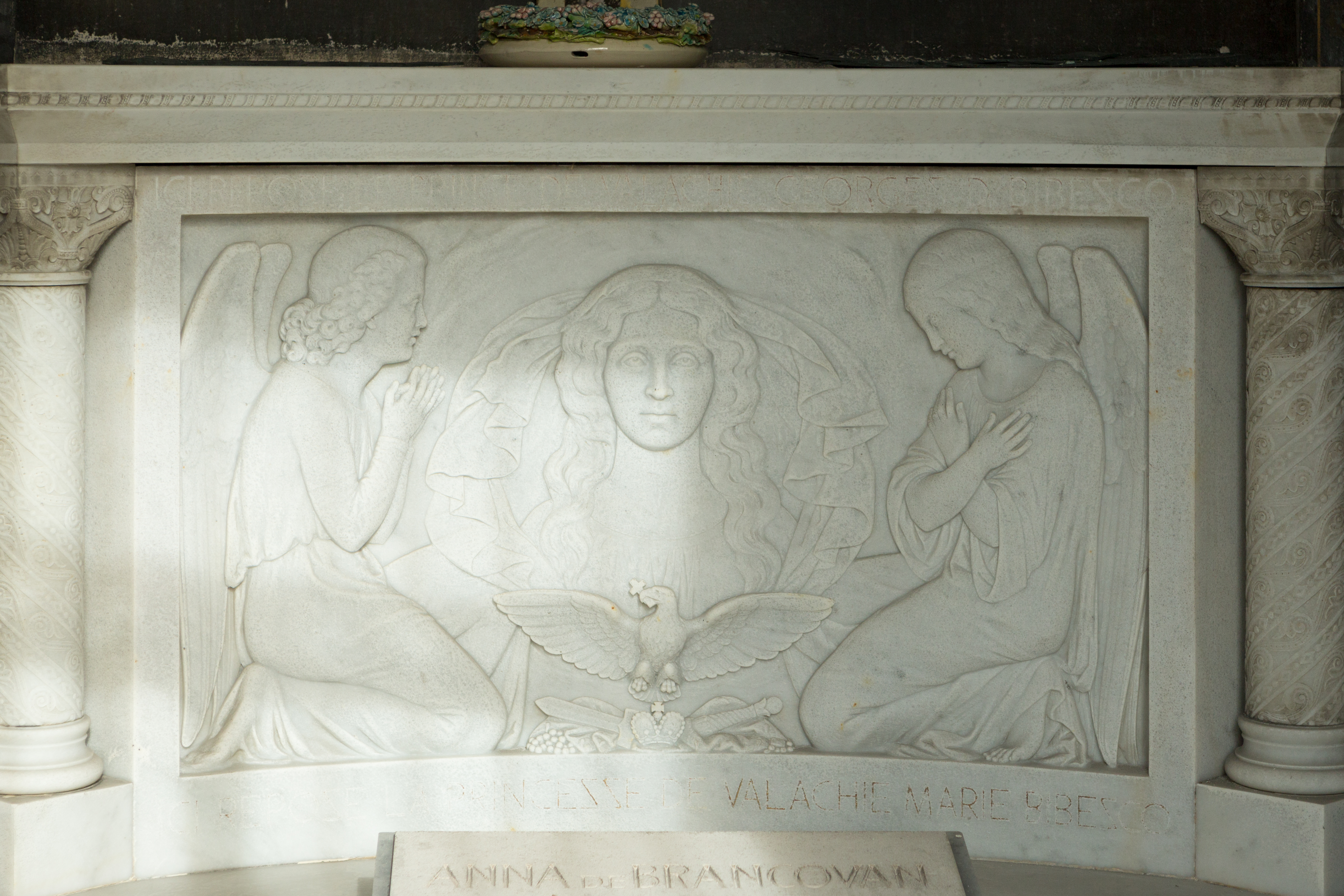 Sépulture de Georges-Démètre Bibesco (1804-1873), secrétaire de l'assemblée générale de Valachie ; Maria Vacaresco (1815-1859), sa 2e épouse ; Anna de Noailles (1876-1933), poétesse et romancière. Chapelle que "Georges-Démètre Bibesco, exilé à Paris en 1850, fit élever. Chapelle expiatoire liée à la mort précoce de sa femme Marie Bibescu en 1859, et servant de sépulture familiale. Construite par l'architecte Antoine-Martin Garnaud sur plan circulaire qui évoque une église byzantine, elle est ornée à l'extérieur d'éléments sculptés qui citent ceux de l'église épiscopale de Curtea de Arge, et à l'intérieur, d'un décor peint à fresque par Jean-Baptiste-Auguste Leloir qui avait déjà travaillé avec Garnaud. Quant au devant d'autel sculpté en marbre blanc, non signé, il est attribué par l'auteur à Eugène Oudinié" (Badea-Păun 2004).